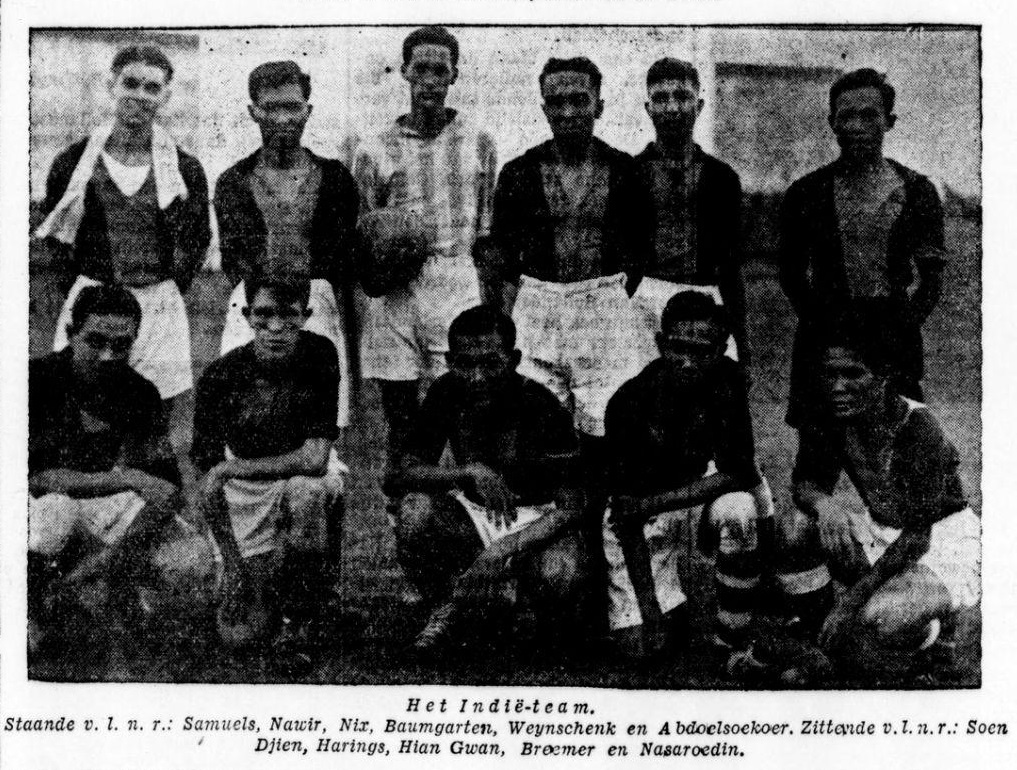 Het Nederlands-Indisch elftal 1935. Harings zittend 2e van links.